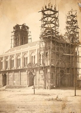 Imagem das obras de construção da Igreja de São Geraldo